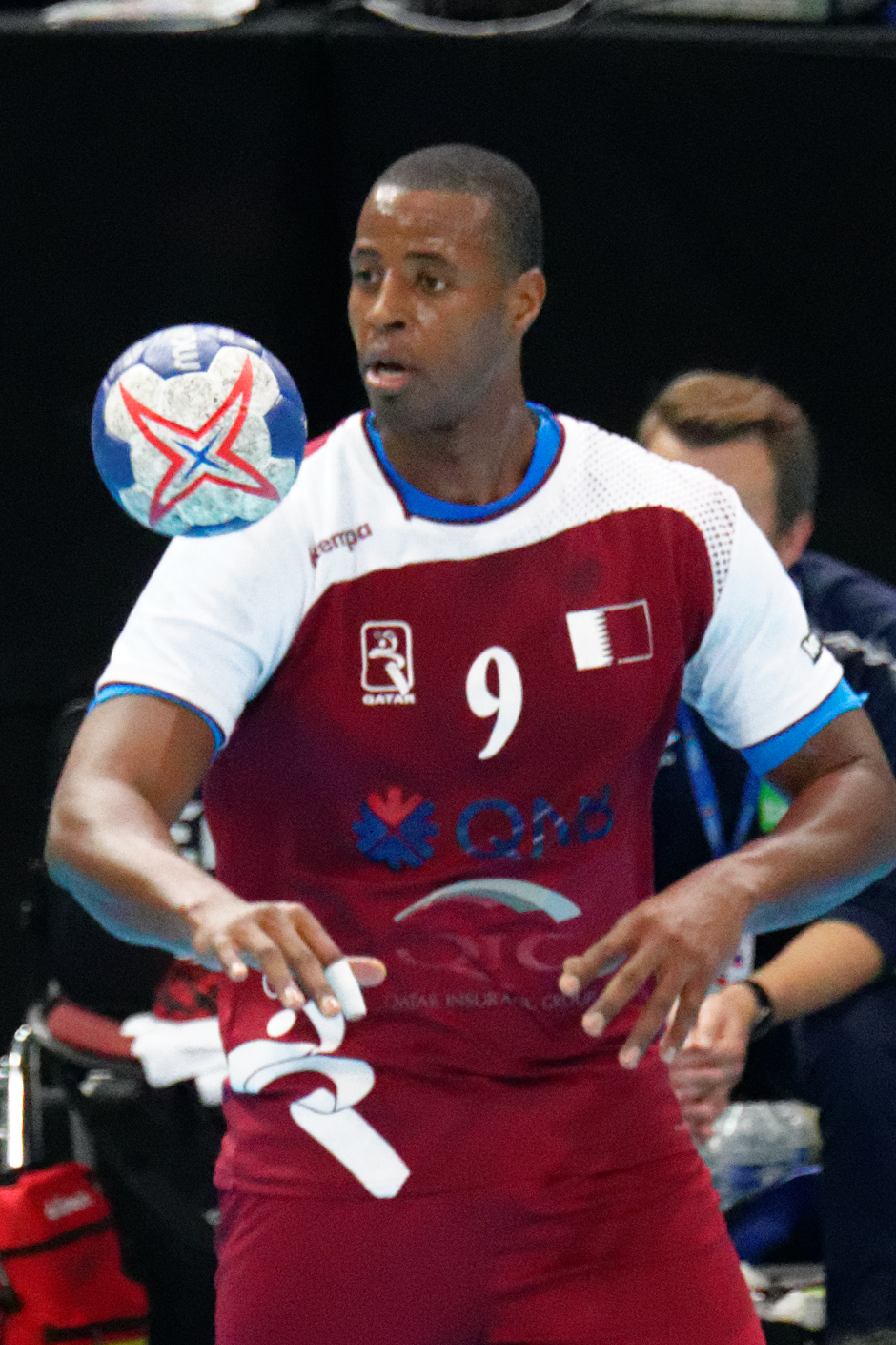 Le 10 janvier 2016 lors du match Norvège / Qatar durant la Golden League à l'AccordHotel Arena (Paris). Rafael Capote